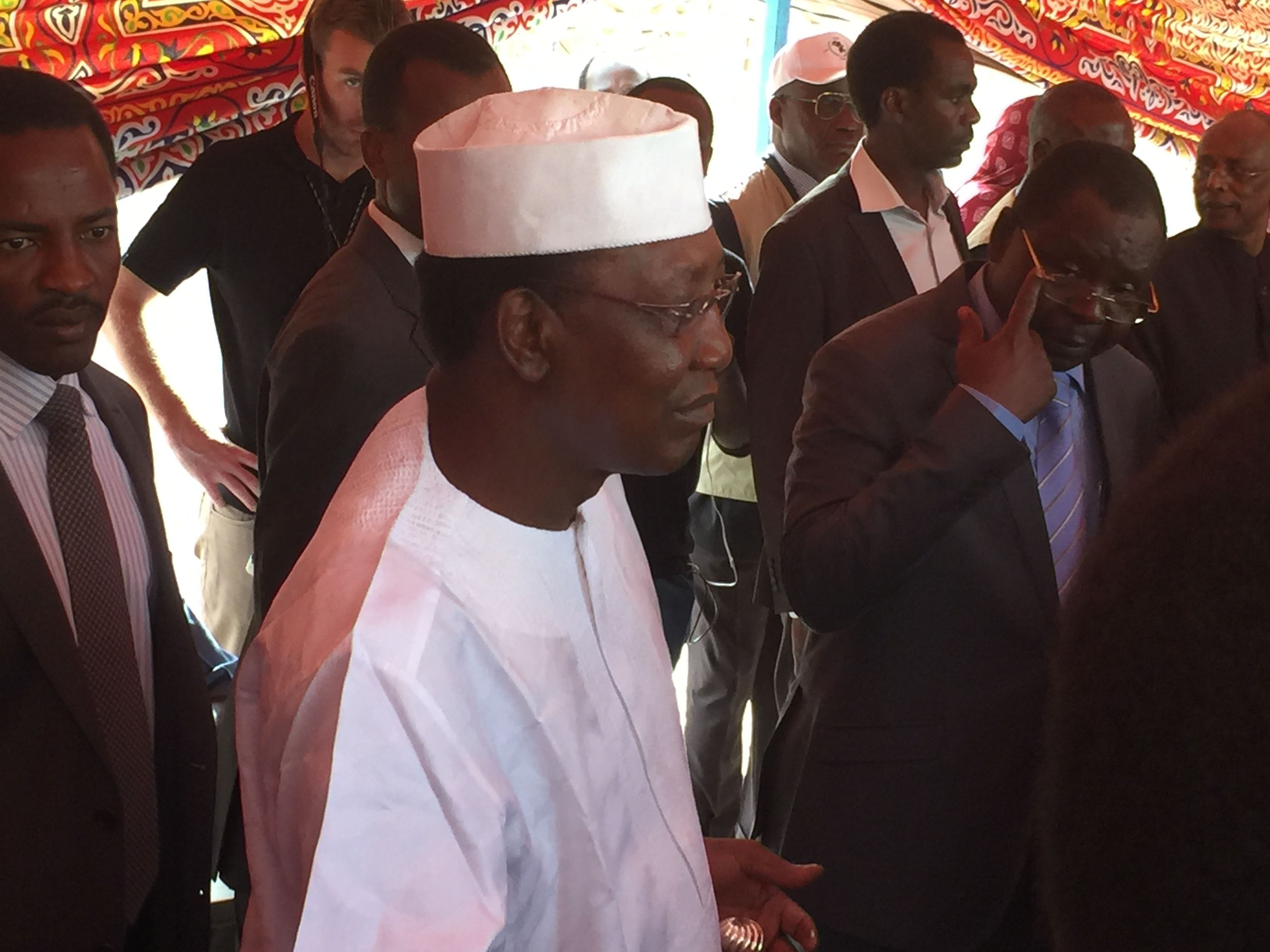 Le président Idriss Deby, dans son bureau de vote dans le 2ème arrondissement de N'Djamena, Tchad, 10 avril 2016. Le président sortant, Idriss Deby Itno, au pouvoir depuis 26 ans et candidats à sa propre succession, a voté vers 8h dans le centre de vote du quartier Djambalangato dans le 2ème arrondissement de la capitale N’Djamena.